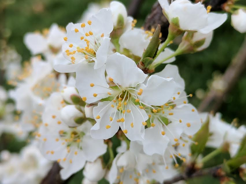 Prunus salicina "Santa Rosa" cultivar